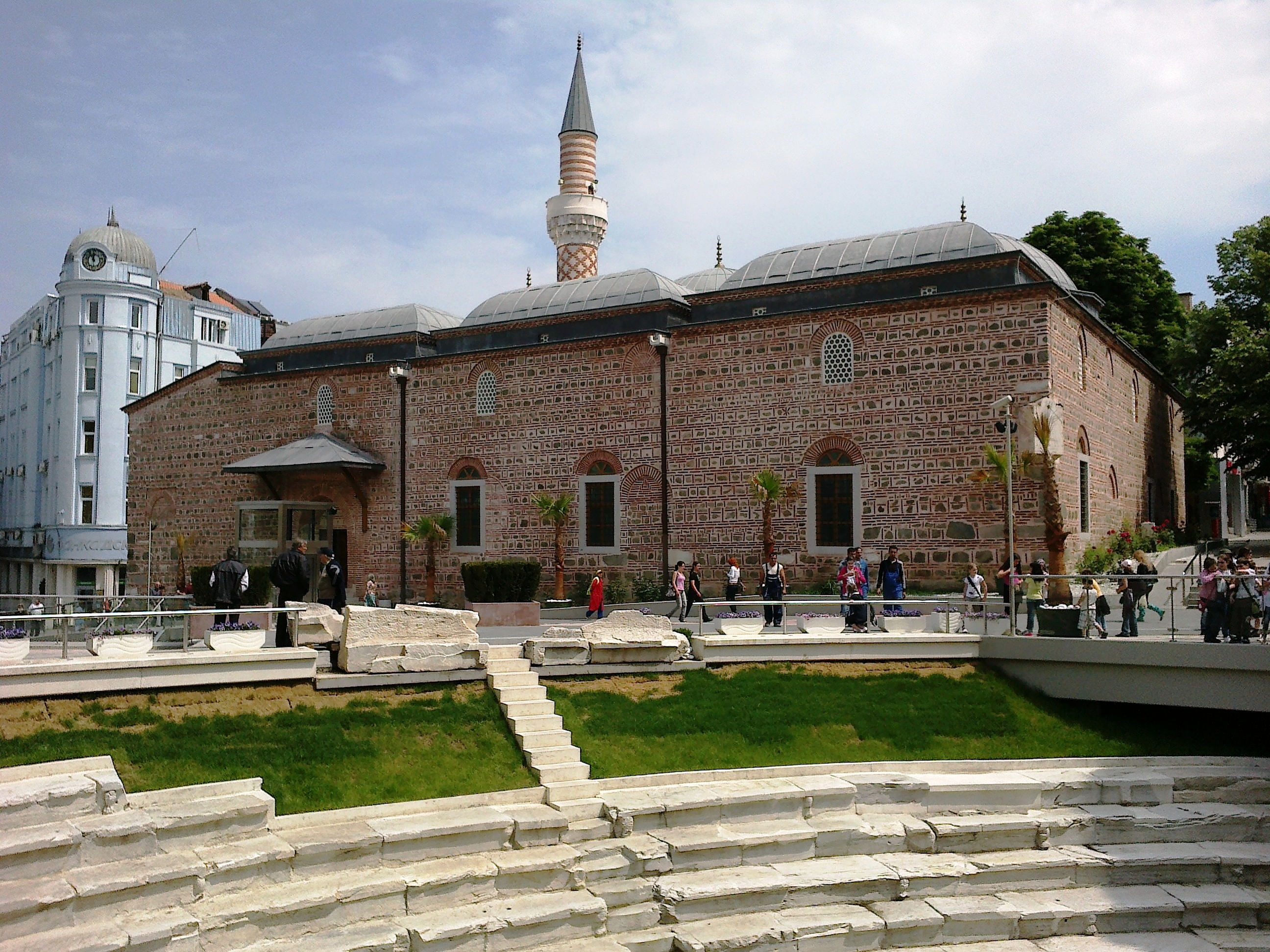 Джумая джамия и Античния стадион на Филипопол (долу)